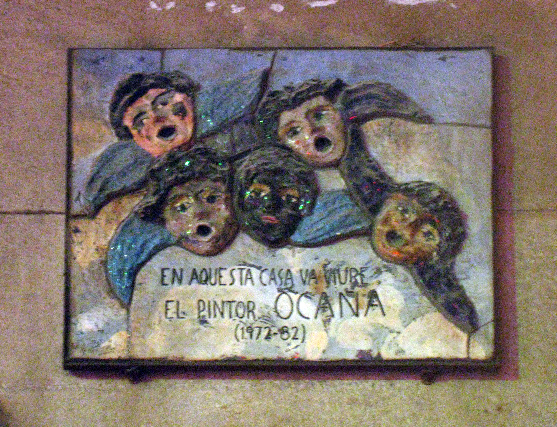 Ocaña. Pl. Reial, 12 (Barcelona)